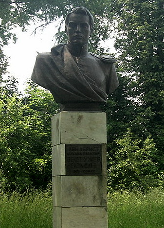 Памятник Михаилу Павловичу Бестужеву-Рюмину в с.Кудрёшки Нижегородской области